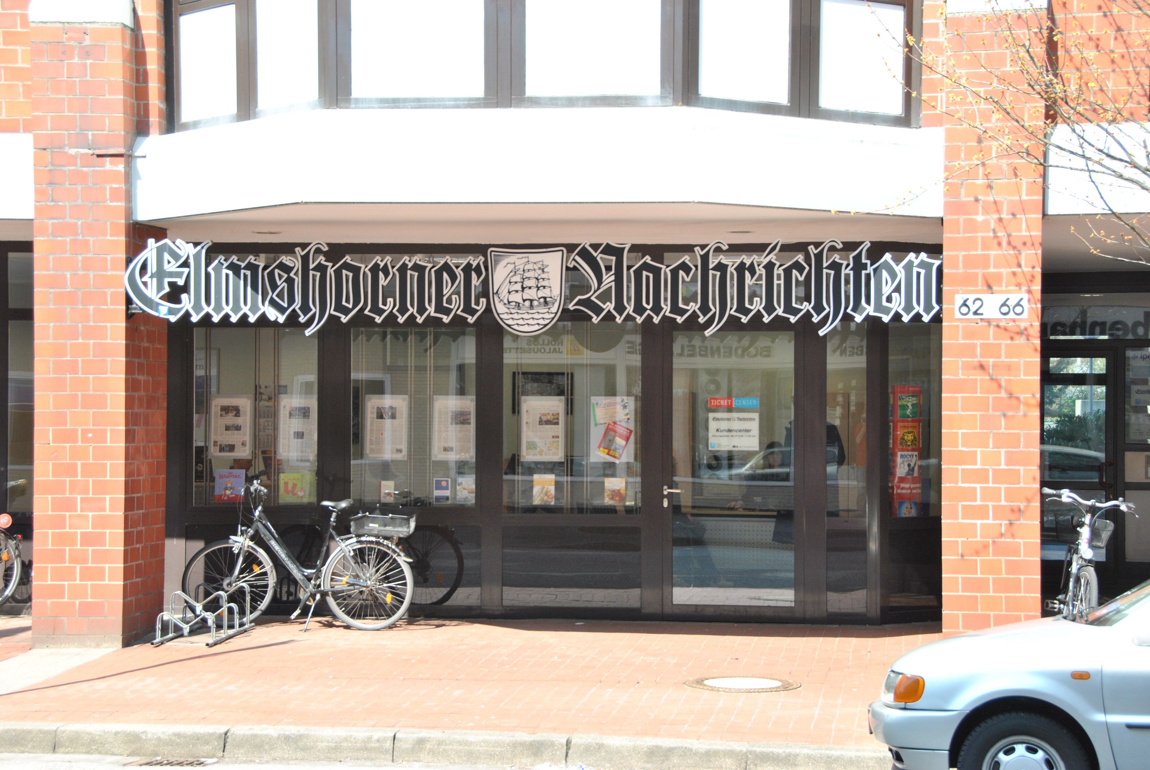 Geschäftsstelle der Elmshorner Nachrichten